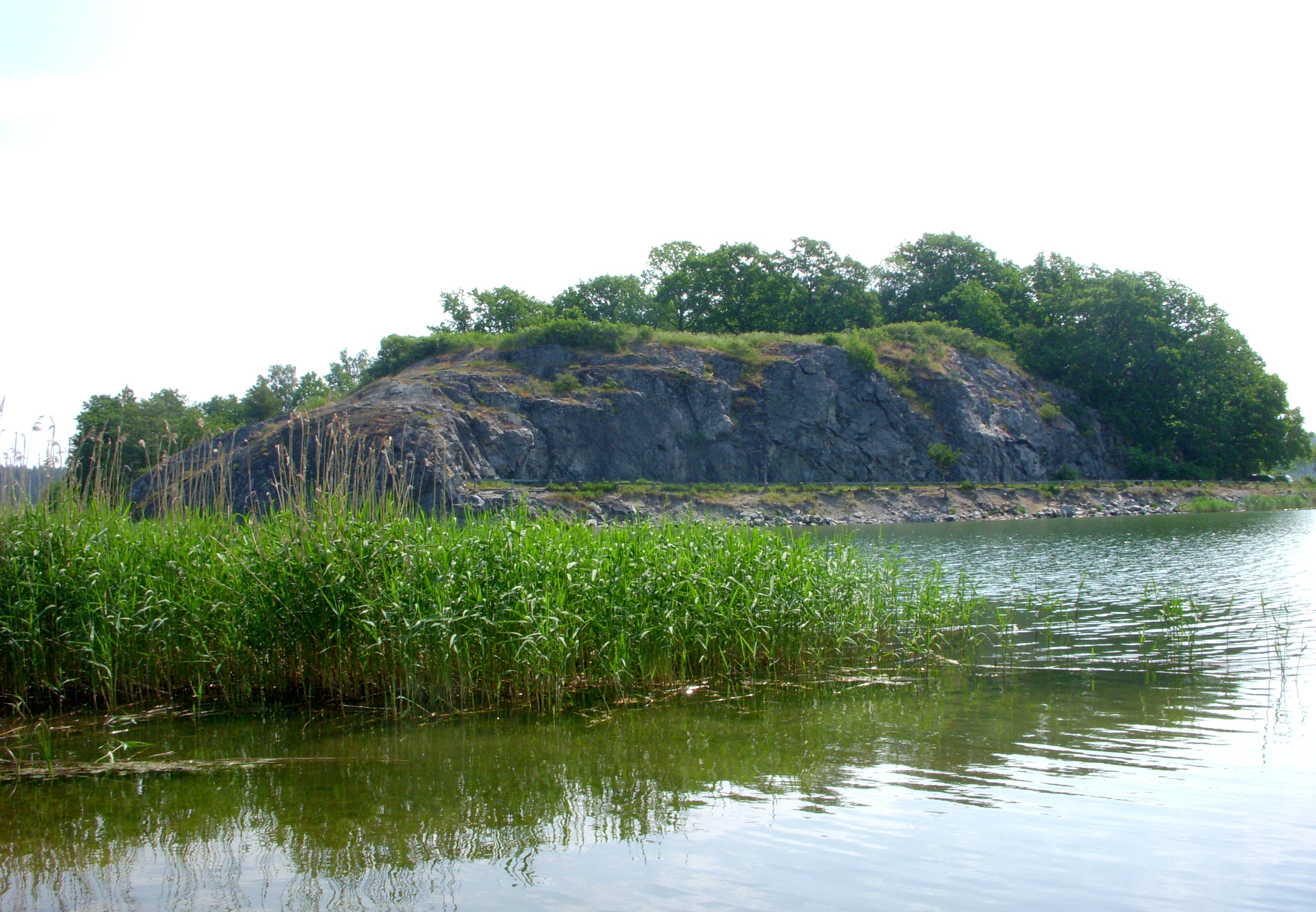 Kasholmsskansen låg på toppen av kullen, vy över Pålsundet mot öst.